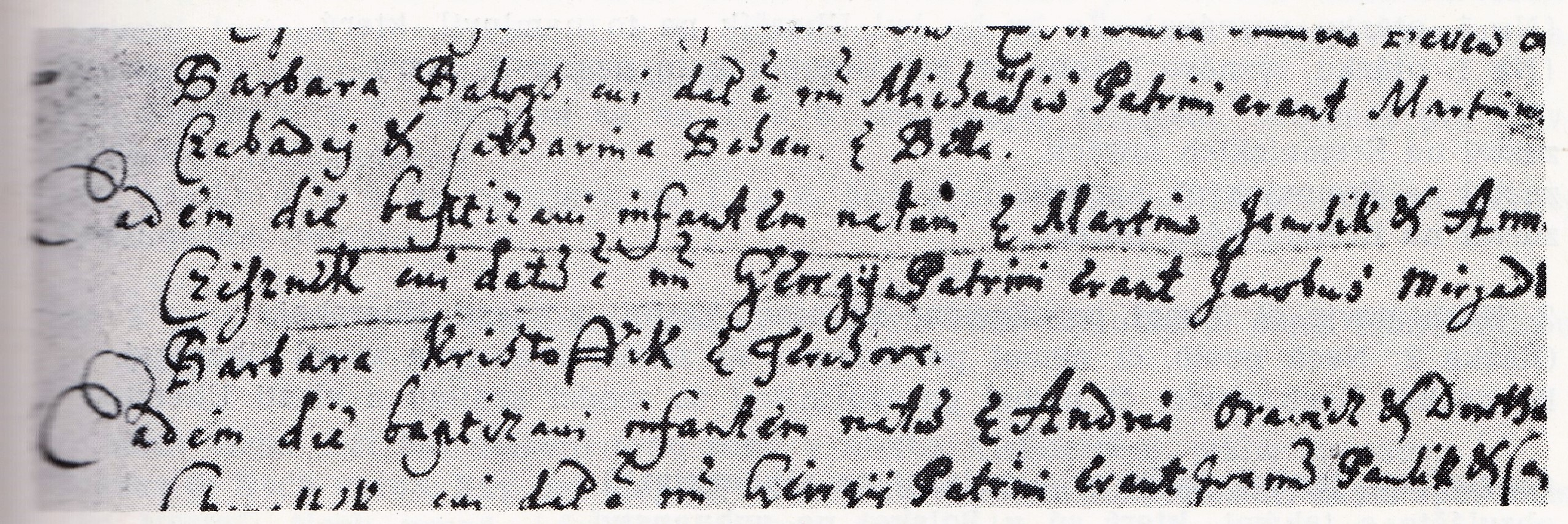 Záznam z farskej matričnej knihy vo Varíne o pokrstení Juraja Jánošíka z Terchovej . 16. mája 1688. Jeho otec bol Michal, matka Barbora, rodená Cingelová. Mal staršieho brata Jána. Záznam je v latinčine. O dátum narodenia tohto slovenského zbojníka sa sporia historici, ktorí uvádzajú ešte jeden dátum a to 25. január 1688. Nie je spoľahlivo dokázaný skutočný dátum jeho krstu.